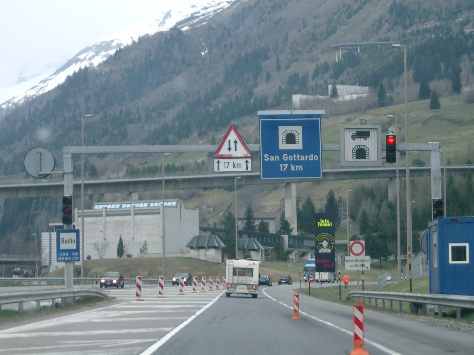 Einfahrt in den Gotthard-Strassentunnel von Süden aus